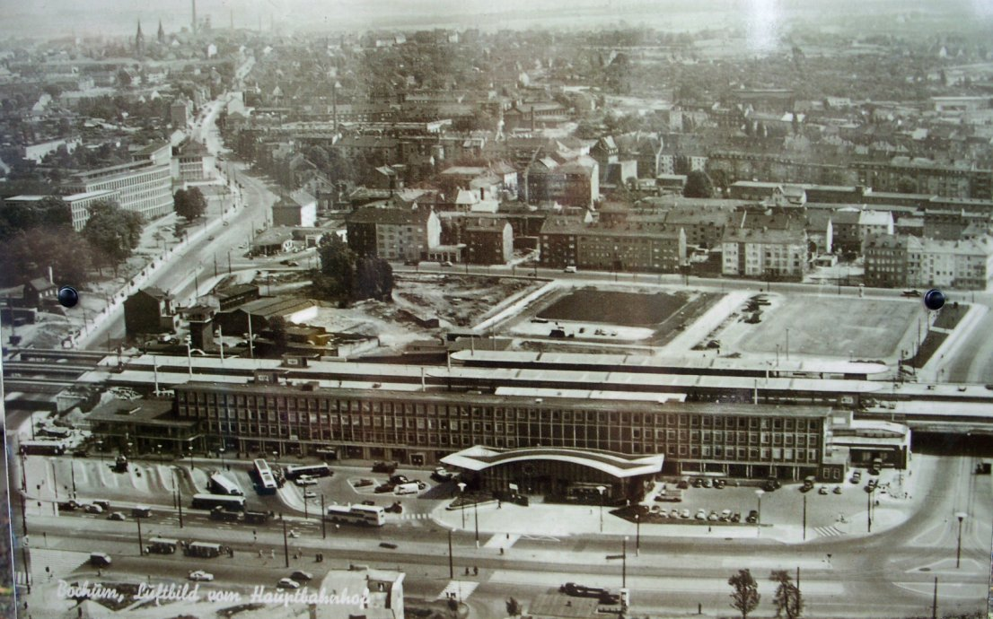 Luftbild des Bochumer Hauptbahnhofes, vermutlich Ende der 1950er Das neue Gebäude der Hauptpost hinter dem HBf steht noch nicht, oben links kann man noch die Fördergerüste der Zeche Dannenbaum auf dem Gelände des heutigen Opel-Werkes sehen.